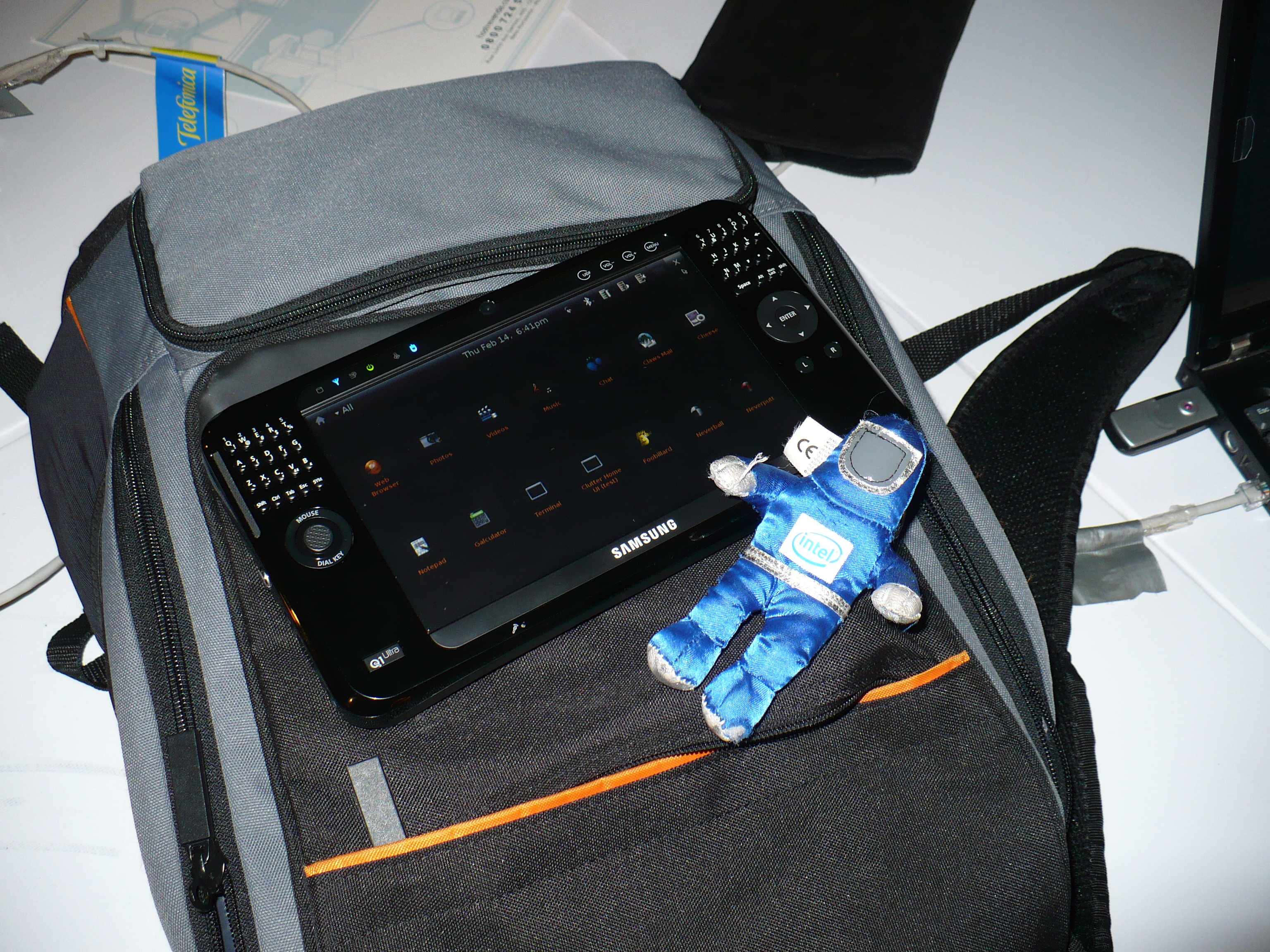 Samsung Q1 rodando uma versão móvel do Ubuntu. Projeto da Intel, apresentado por Sulamita Garcia.